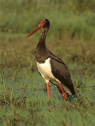 black stork